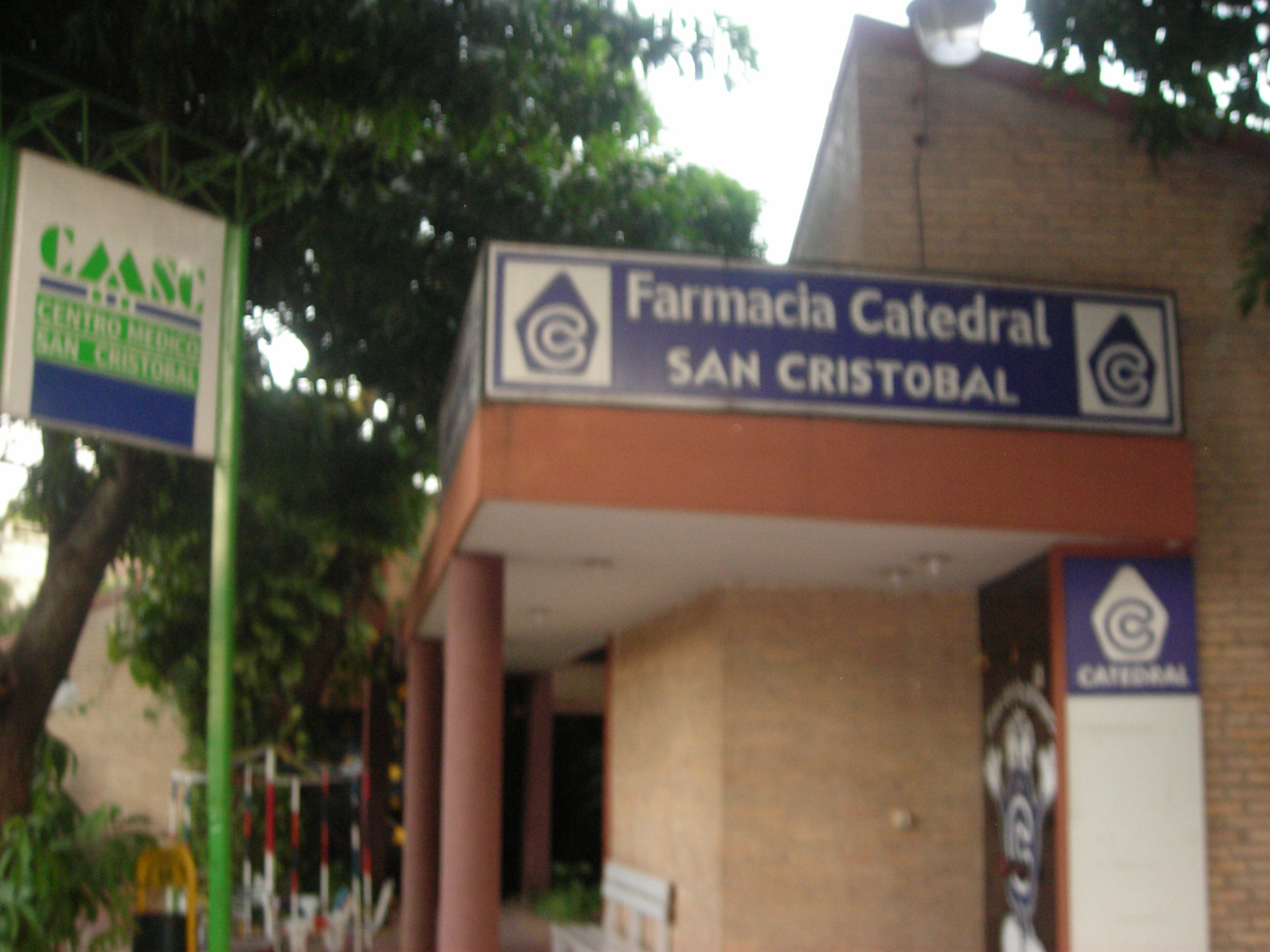 Farmacia